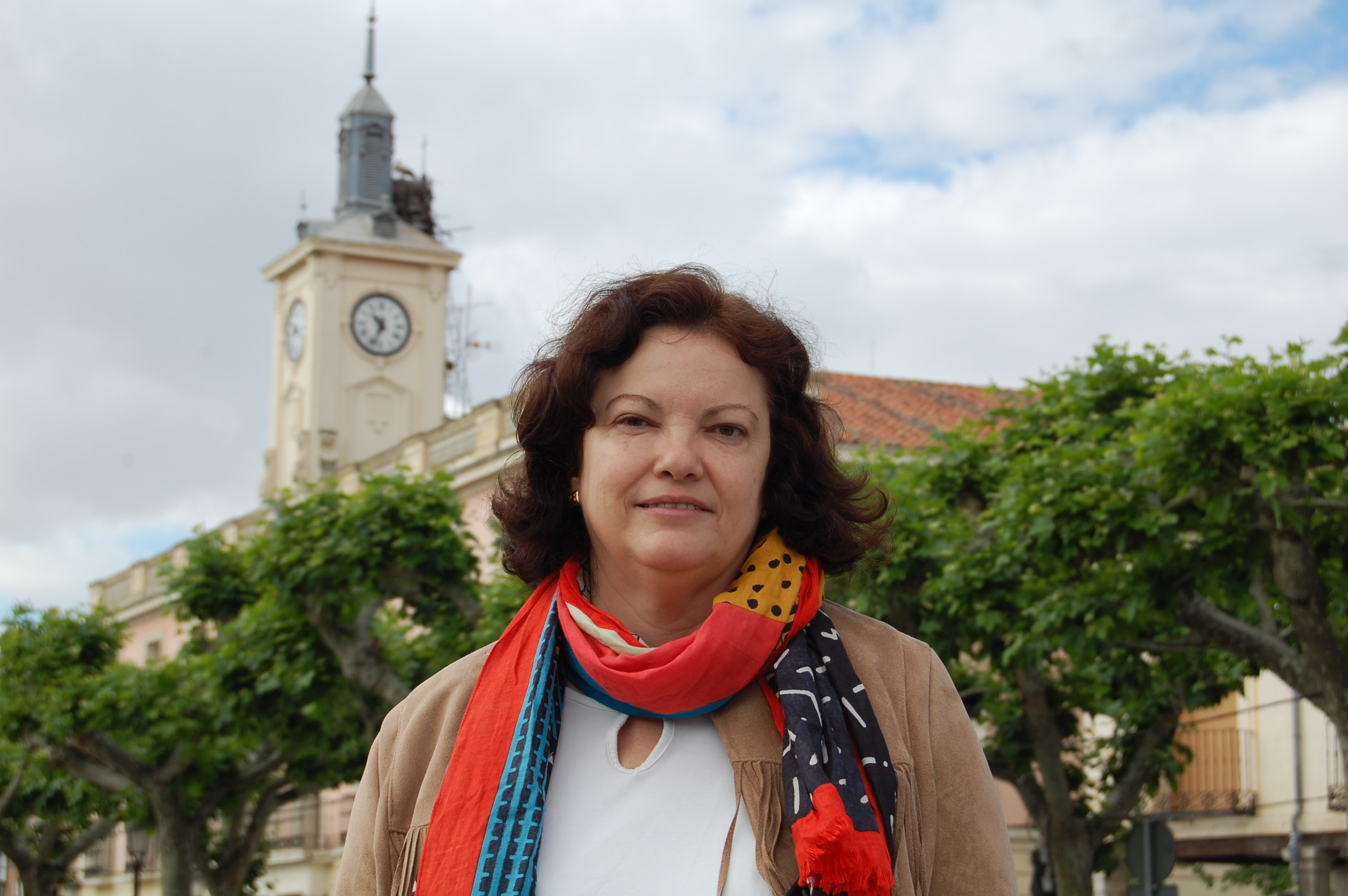 Pilar Lledó Collada, historiadora y presidenta de la Institución de Estudios Complutenses. Fotografía tomada en la Plaza de Cervantes de Alcalá de Henares (Comunidad de Madrid - España).